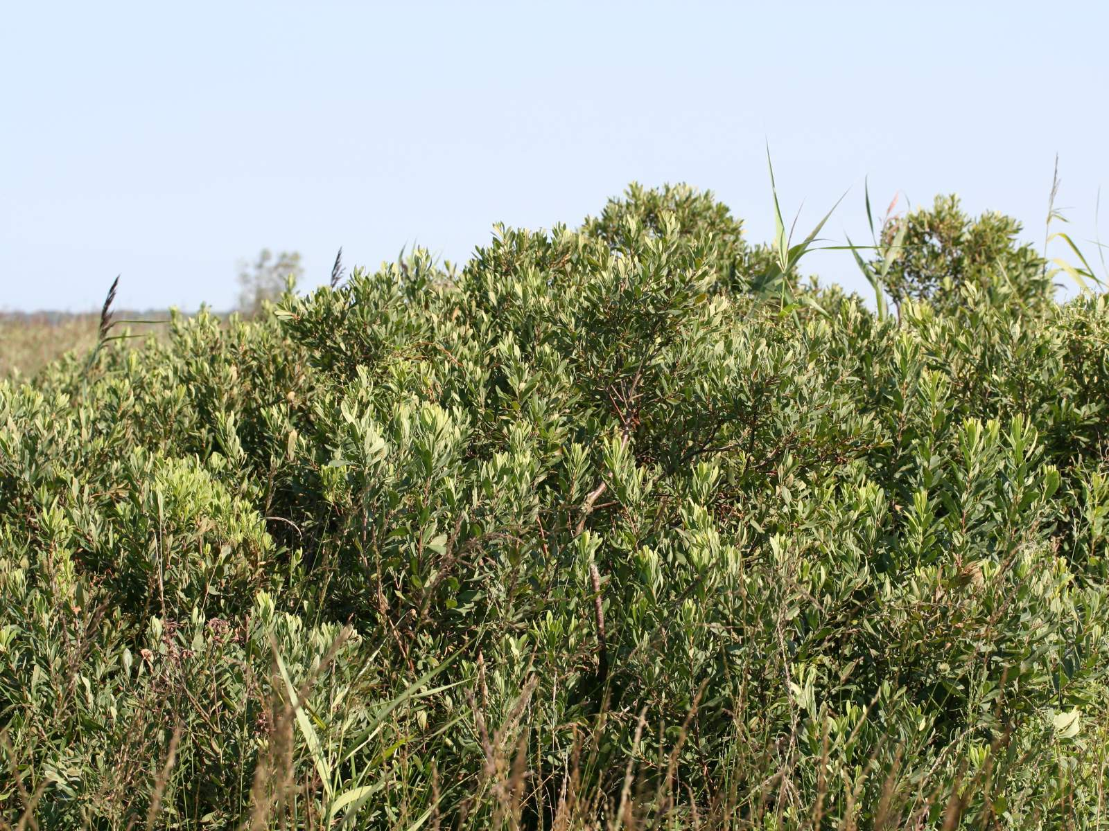 Gagelstrauch (Myrica gale)